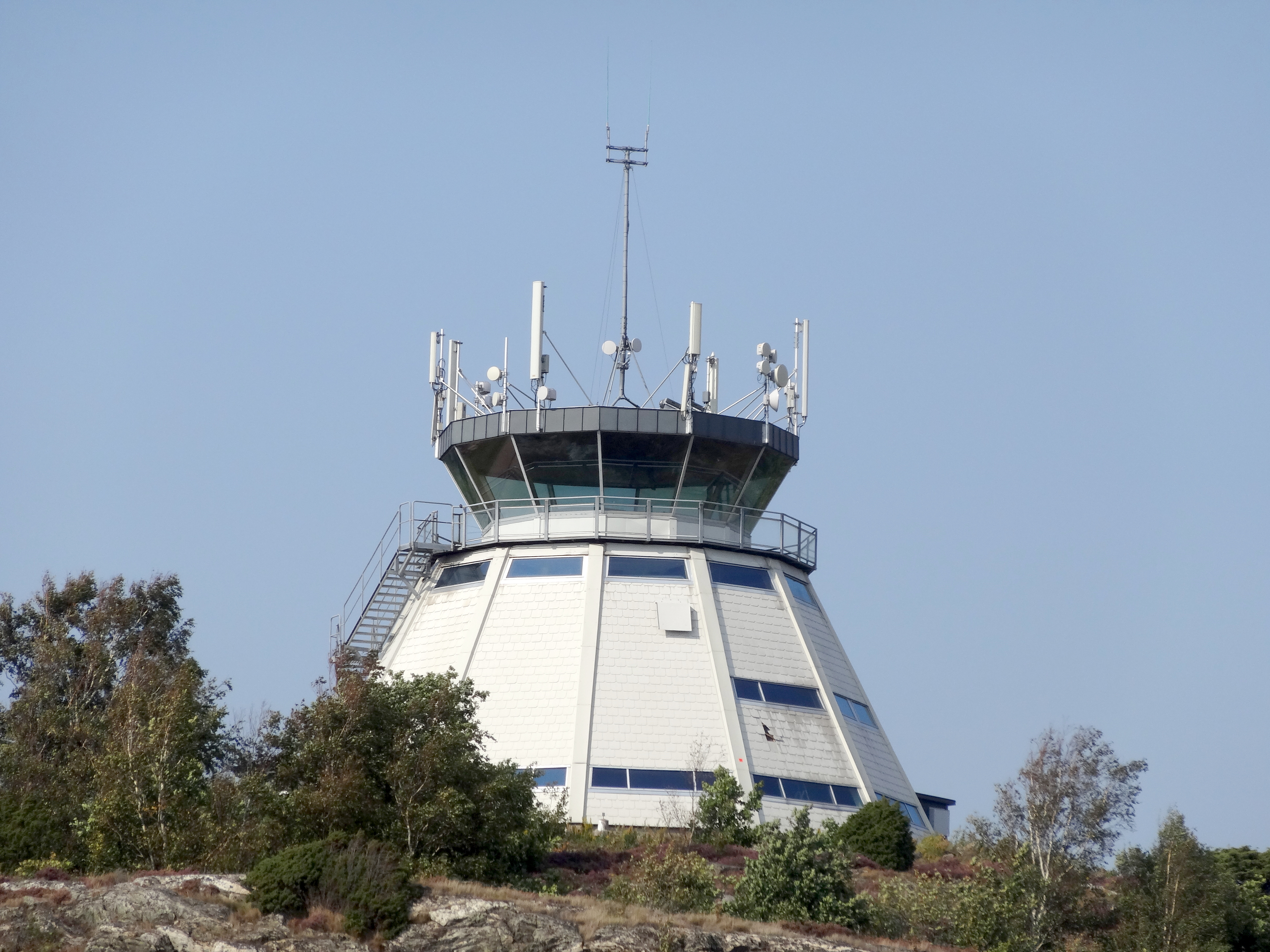 F.d. flygledartornet på Torslanda flygfält.